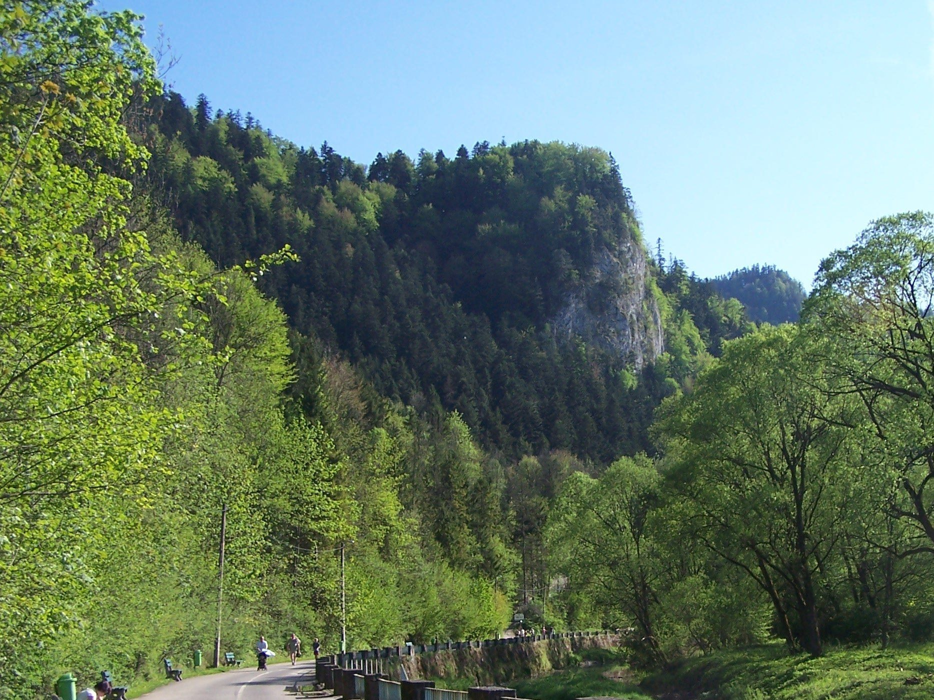 Droga Pienińska (Biała Skała)